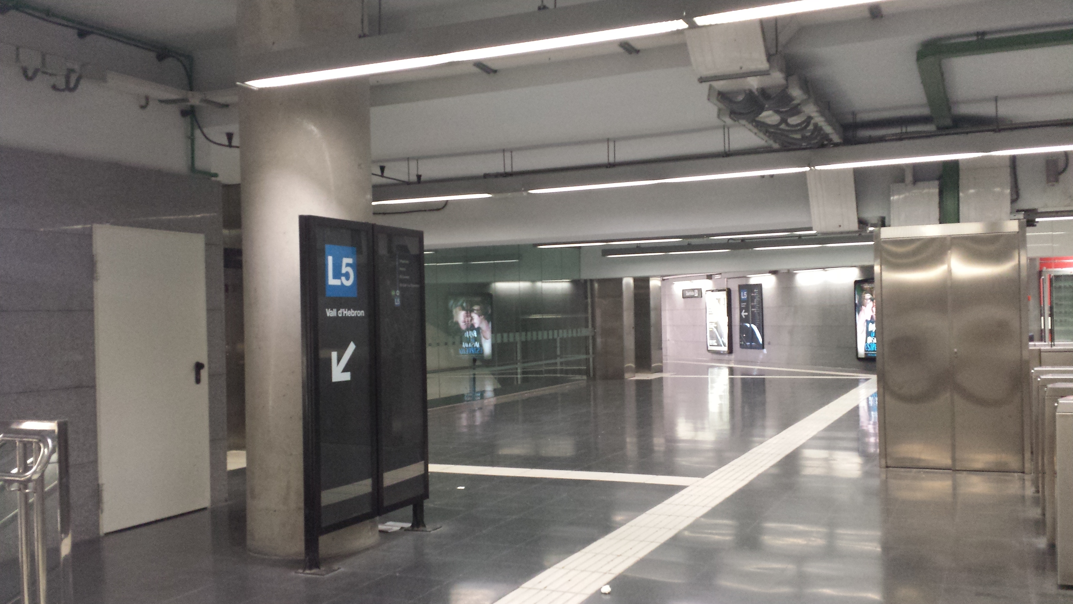 Vestíbul reformat Virrei Amat